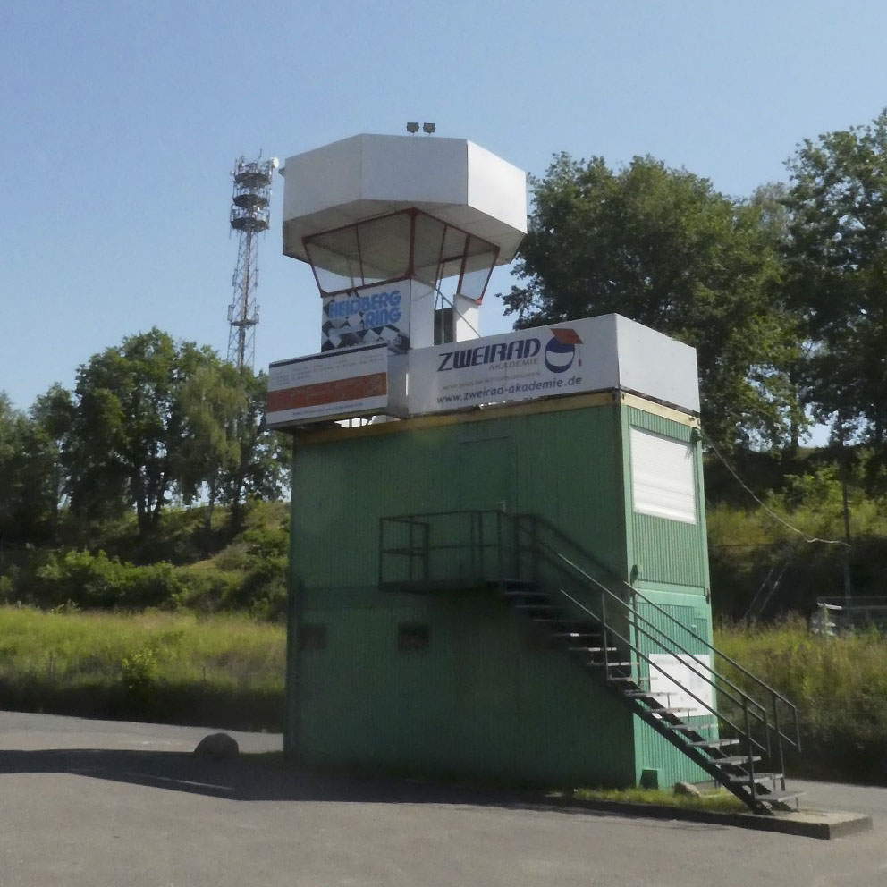 Containergebüde der Racecontrol auf dem Heidbergring bei Geesthacht